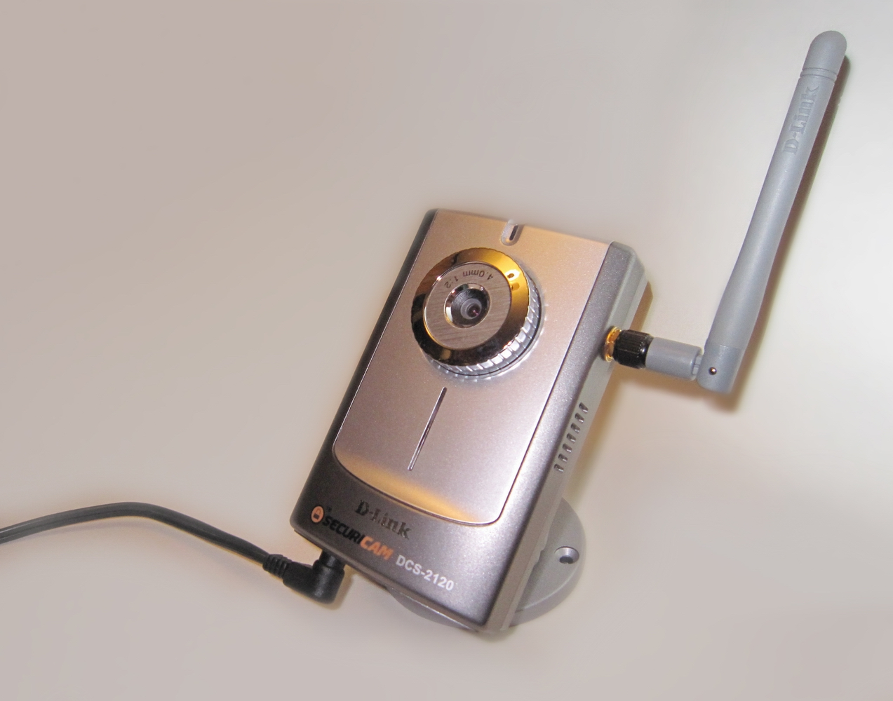 IP kaamera D-Link DCS-2120